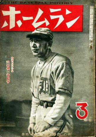 雑誌・ホームラン4巻3号(昭和24年3月)の表紙（天知俊一）